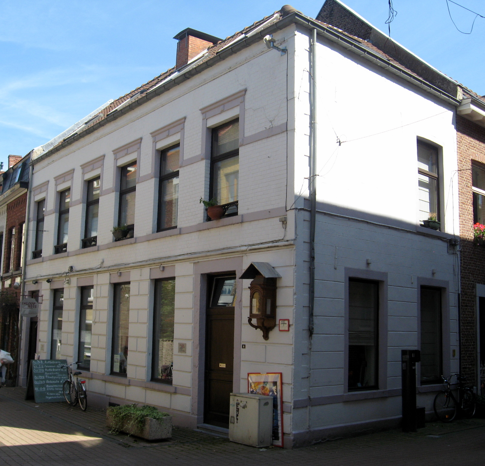 Huis De Abraham, voormalige stadsboerderij in Hasselt